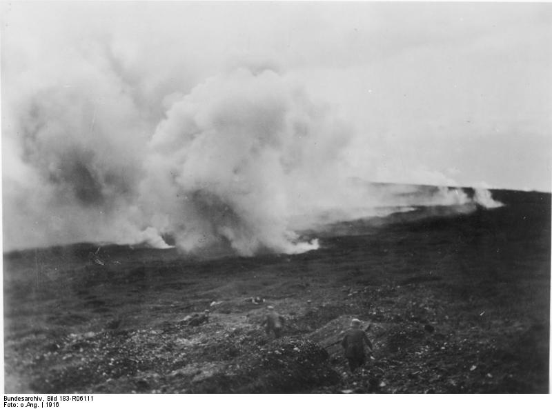 [1.] Weltkrieg [1914 - 1918] Sperrfeuer bei Verdun